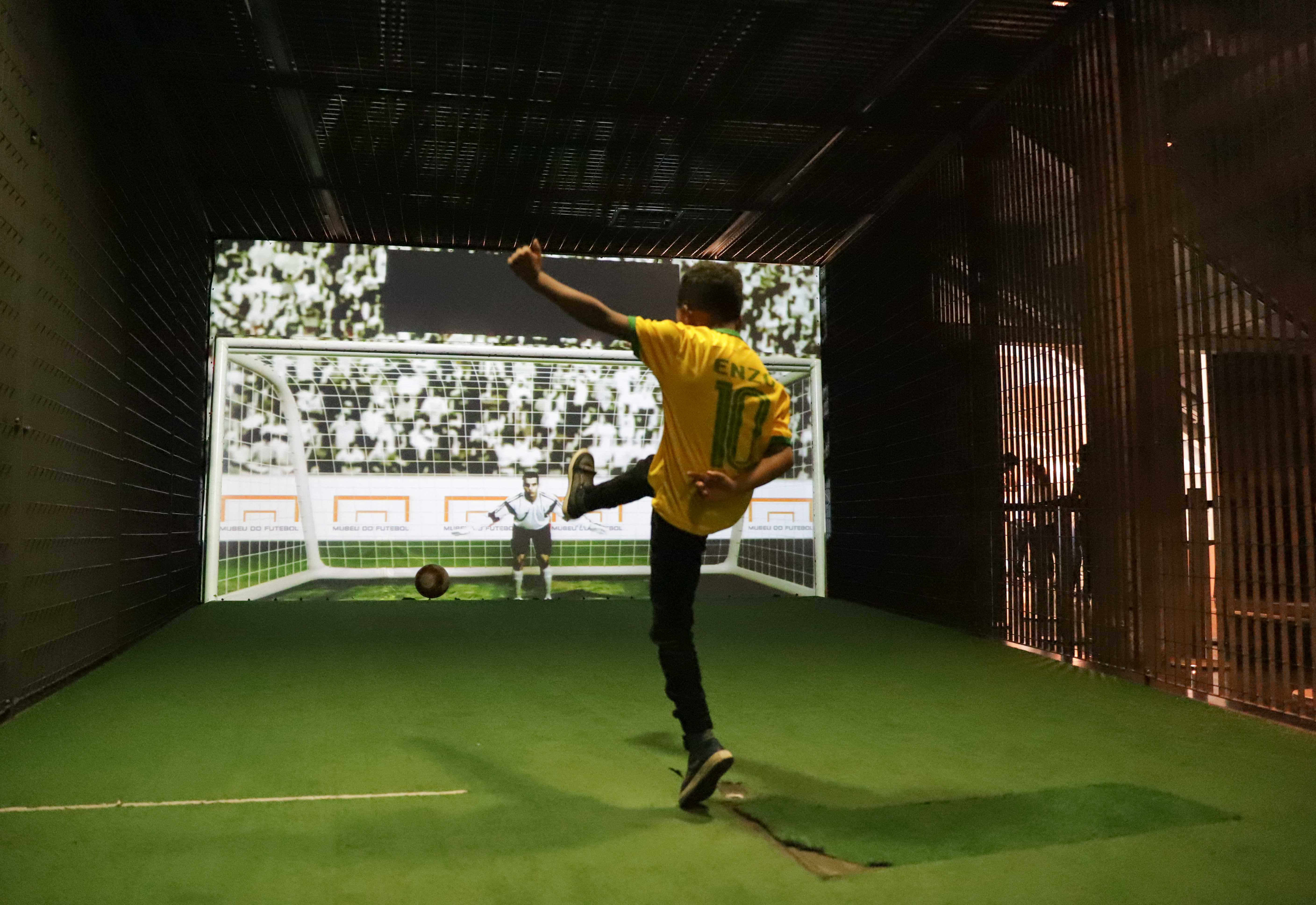 Torcedores assistem o jogo Brasil X Sérvia no Museu do Futebol. O Museu vai transmitir os jogos na Sala Jogo de Corpo, em um espaço decorado especialmente para a competição. Além dos jogos, o espaço terá opções de interatividade e programação especial de conteúdo. Local: São Paulo/SP Data: 27/06/2018. Foto: Luis Blanco/ Governo do Estado de São Paulo